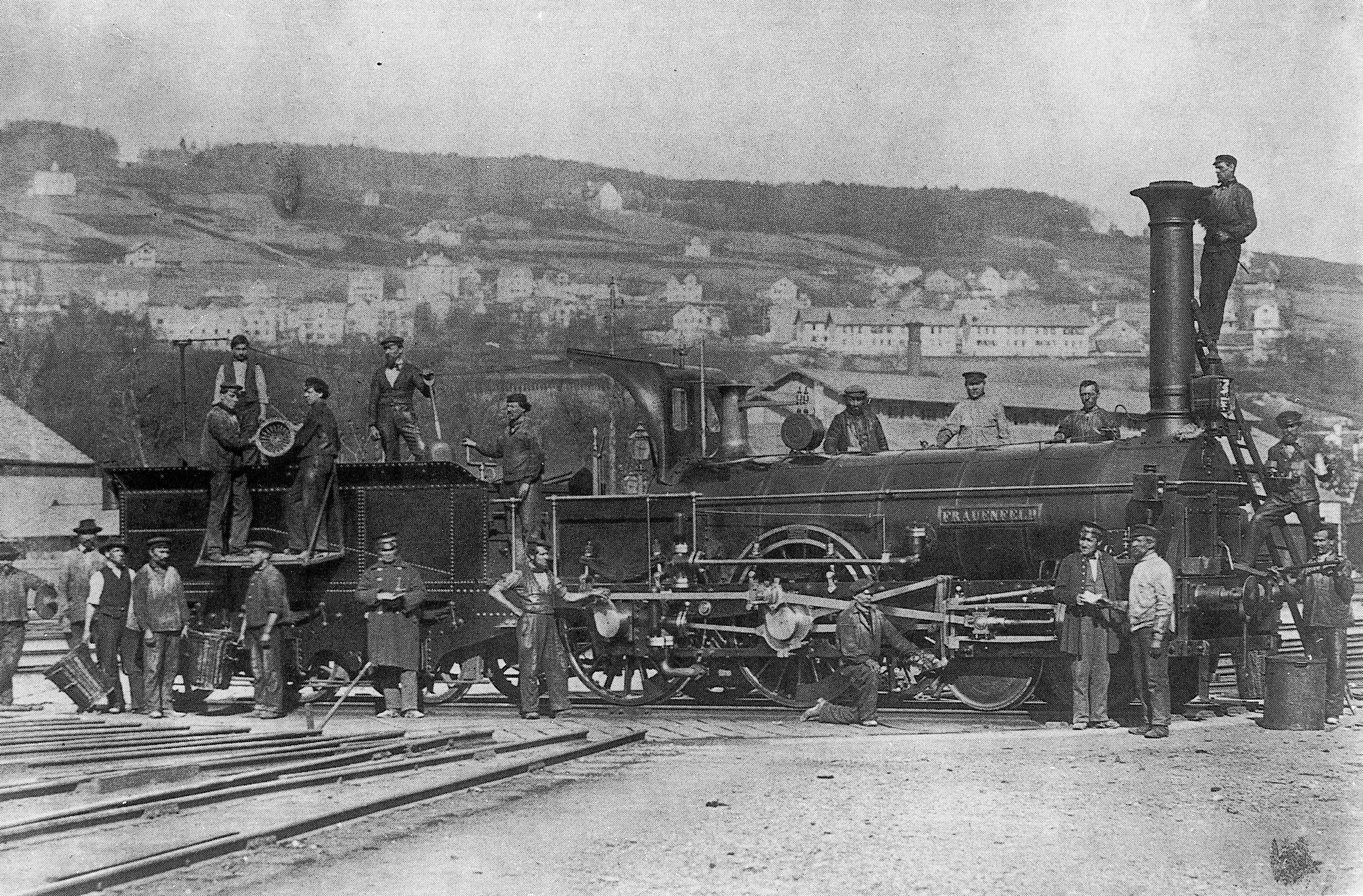 Locomotive Nr. 9 Frauenfeld des Typs B 2/4 der Schweizeriſchen Nordoſtbahn, gebaut 1854 in der Fabrique von J. A. Maffei zů München (Fabr.-Nr. 177), 1887 außer Dienſt geſtellt und anſchließend abgebrochen; aufgenommen um 1863 auf der Drehſcheibe im Bahnhofe von Zürich, beſtanden mit etwa zwantzig Eiſenbahnmitarbeitern.